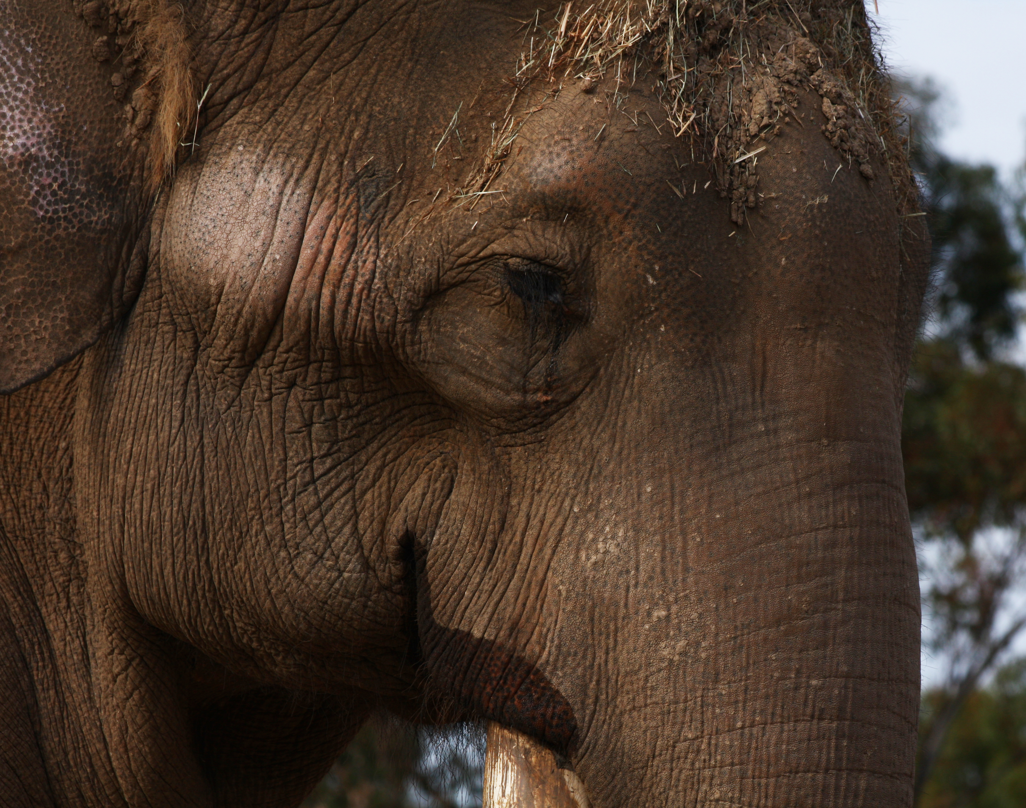 Elephant Face